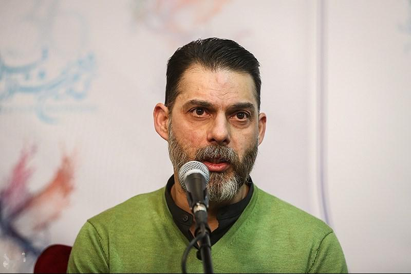 دومین روز سی‌وششمین جشنواره فیلم فجر - ۲ - دومین روز سی‌وششمین جشنواره فیلم فجر با نمایش فیلم‌های شعله‌ور به کارگردانی حمید نعمت‌الله و بمب یک عاشقانه به کارگردانی پیمان معادی در پردیس سینمایی ملت برگزار شد. کنفرانس خبری این فیلم‌ها بعد از اکران آن در کاخ جشنواره برگزار شد.